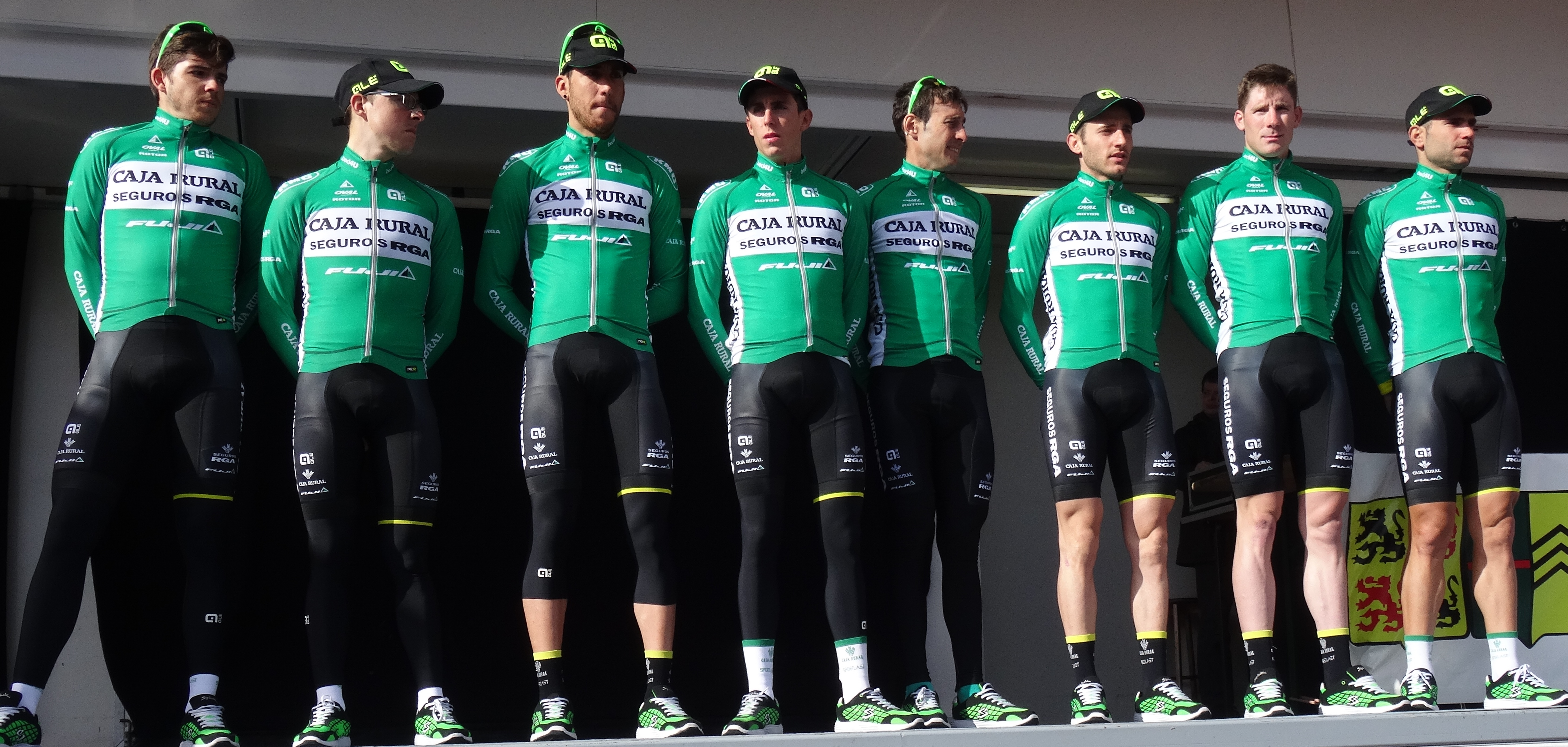 Reportage réalisé le mercredi 4 mars à l'occasion du départ du Samyn des Dames 2015 et du Samyn 2015 à Quaregnon, Belgique.